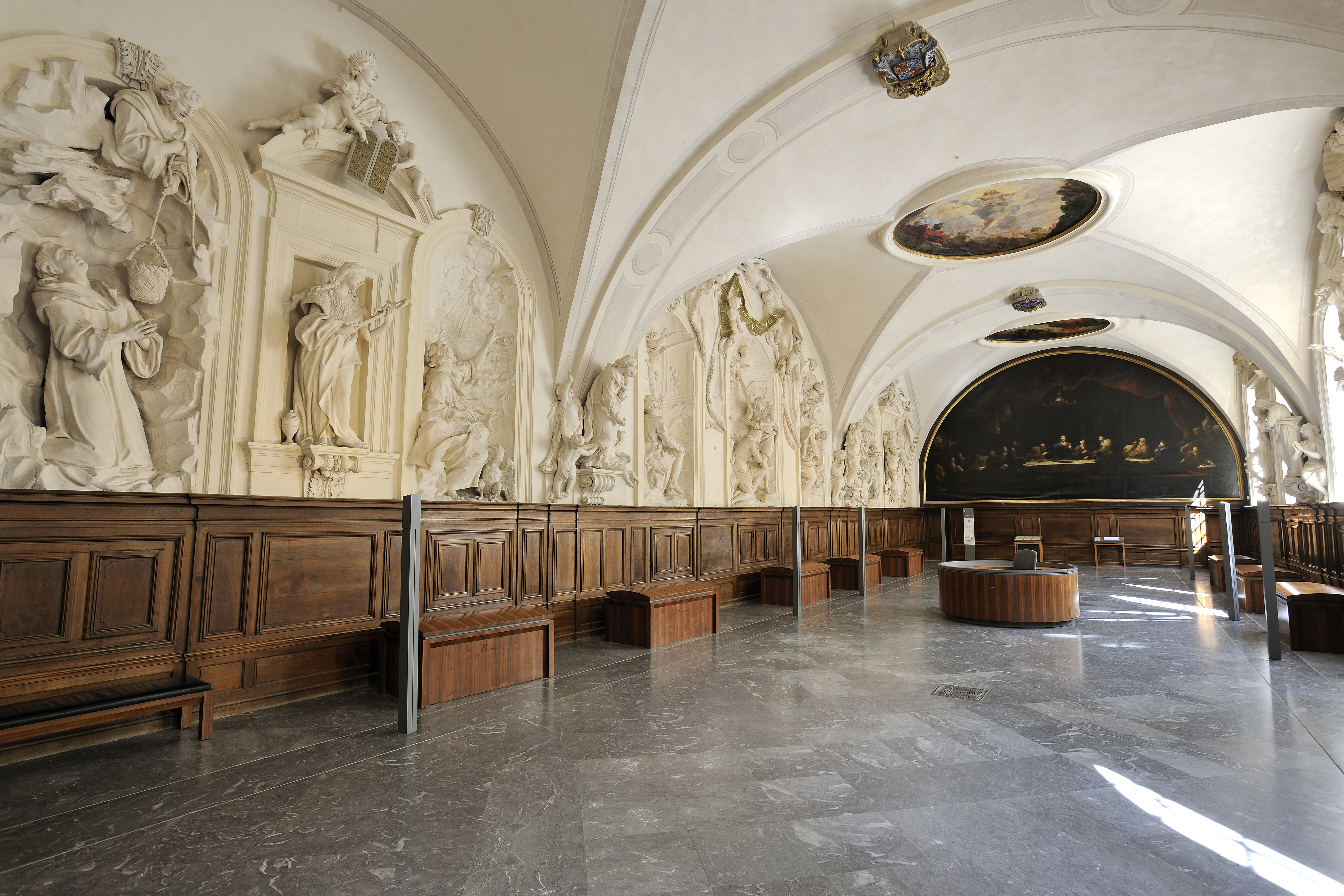 Vaste pièce rectangulaire et voûtée, de 25 x 10 m environ,est éclairée, au sud, par sept fenêtres. Des lambris ornent la partie basse, tandis que la partie haute est ornée de figures en stuc sur les deux longs côtés. Les petits côtés présentent deux grandes toiles cintrées dont le tableau de la Cène par le peintre Louis Cretey est visible sur cette image.